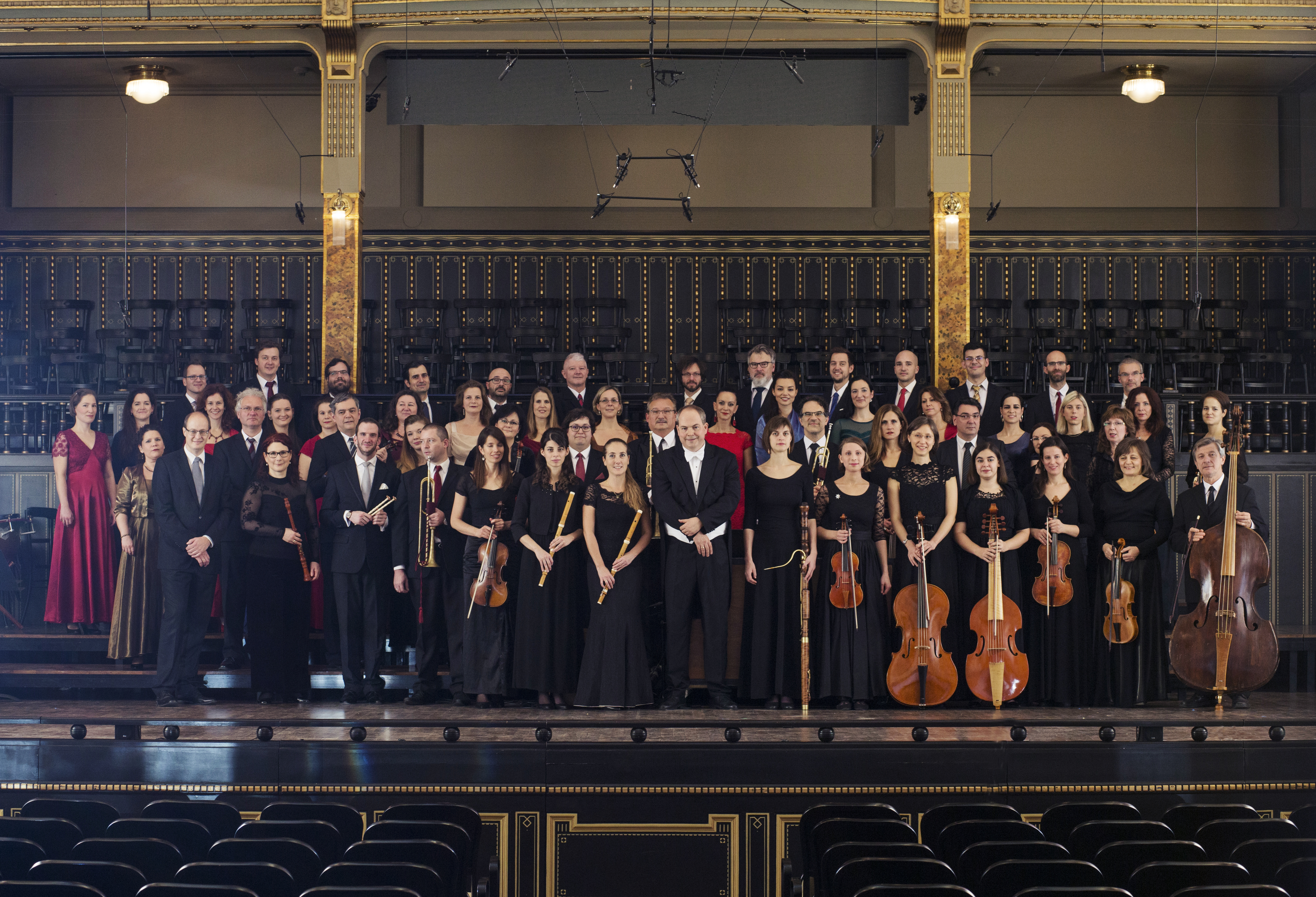 Purcell Kórus & Orfeo Zenekar (Fotó: Raffay Zsófi)